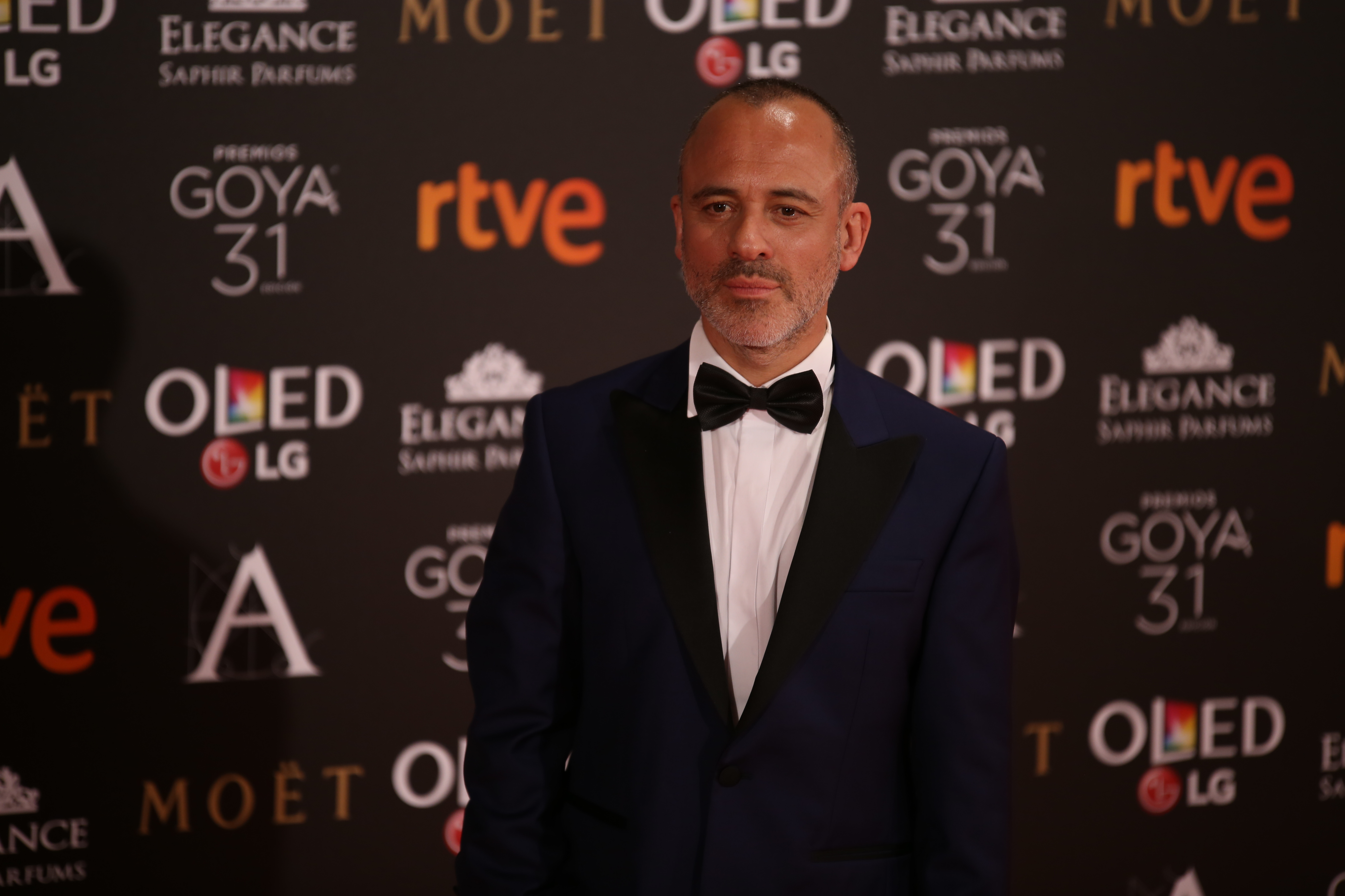 Premios Goya 2017